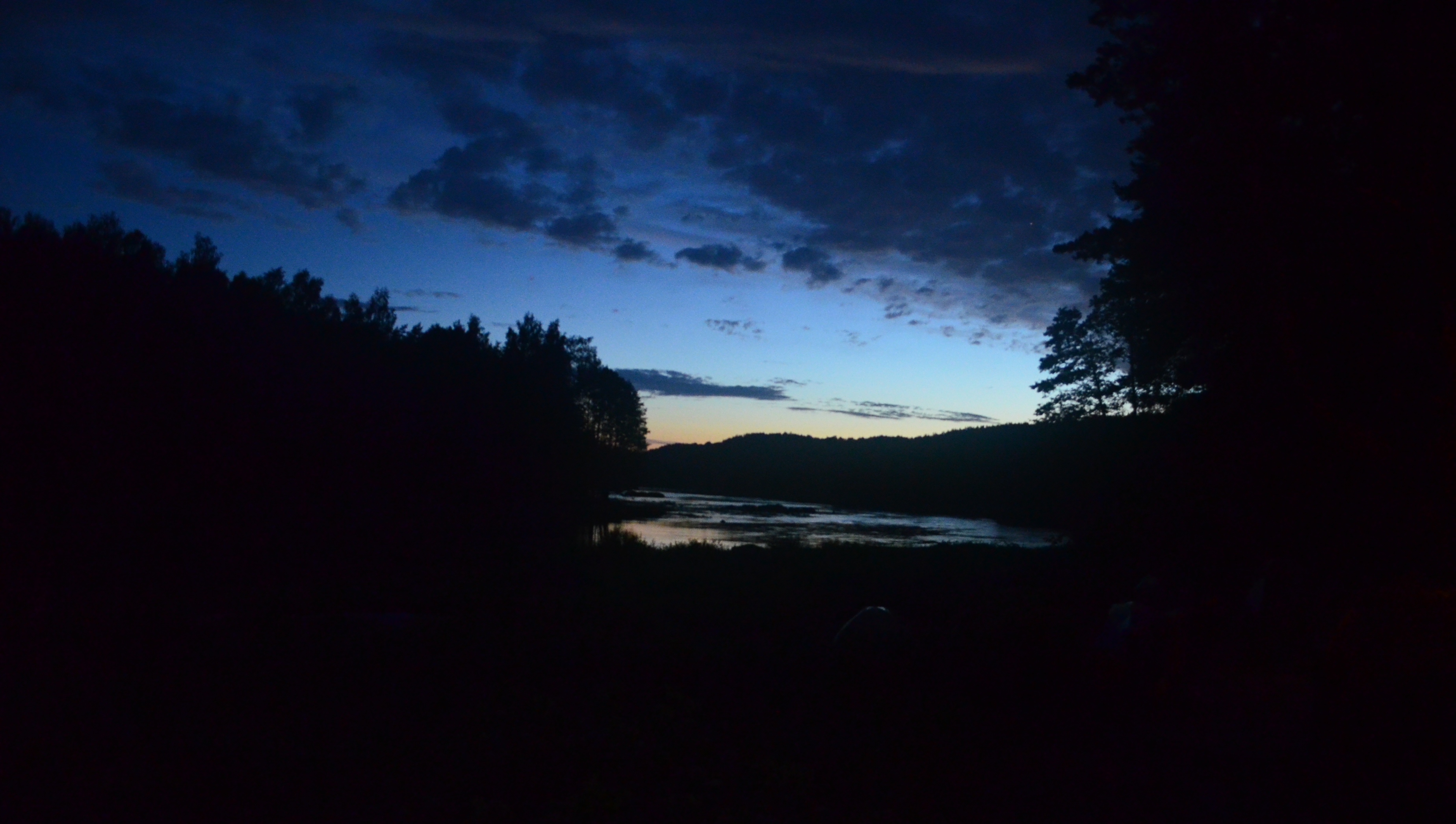 Sutemos virš Neries, Karmazinų apylinkės, Vilniaus raj.